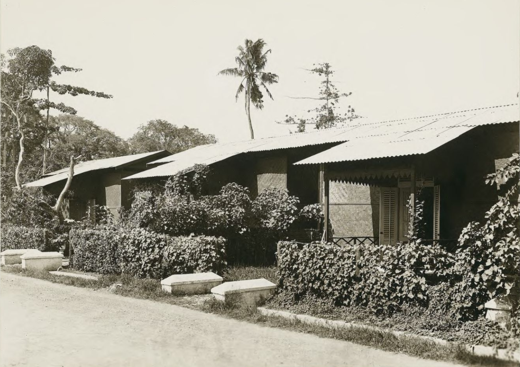 Rumah Masyarakat Industri